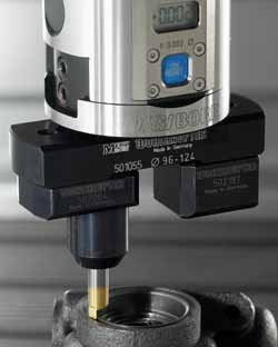 Axialeinstechen mit DigiBore von Wohlhaupter